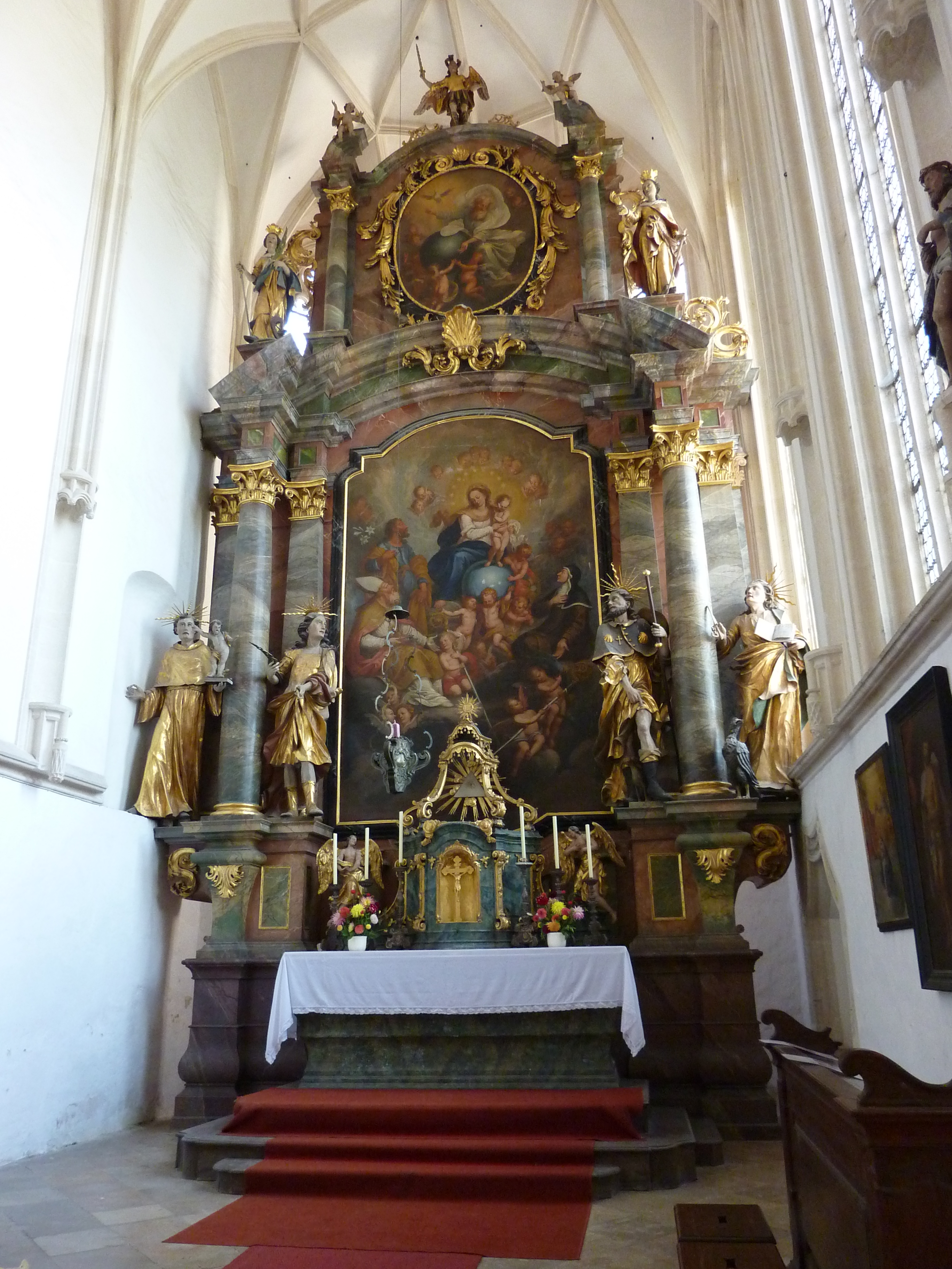 Filialkirche in St. Michael, Weißenkirchen in der Wachau, Niederösterreich - Hochaltar mit Bild Madonna mit Kind, hl. Nikolaus, hl. Josef, hl. Klara; Figuren: hll. Antonius v. Padua, Sebastian, Rochus, Johannes Ev.; im Auszug Bild Gottvater, flankiert von Statuen hll. Katharina u. Barbara, darüber hl. Michael